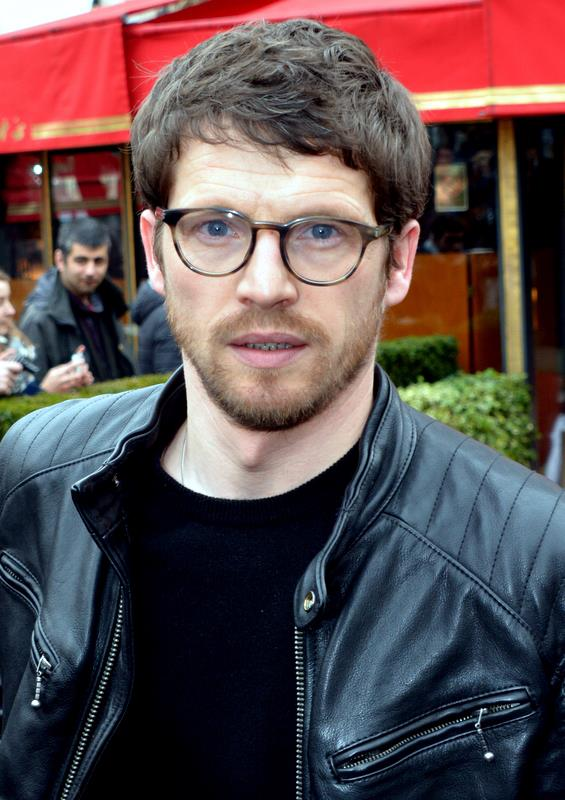 Pierre Deladonchamps au déjeuner des nommés des César du cinéma.